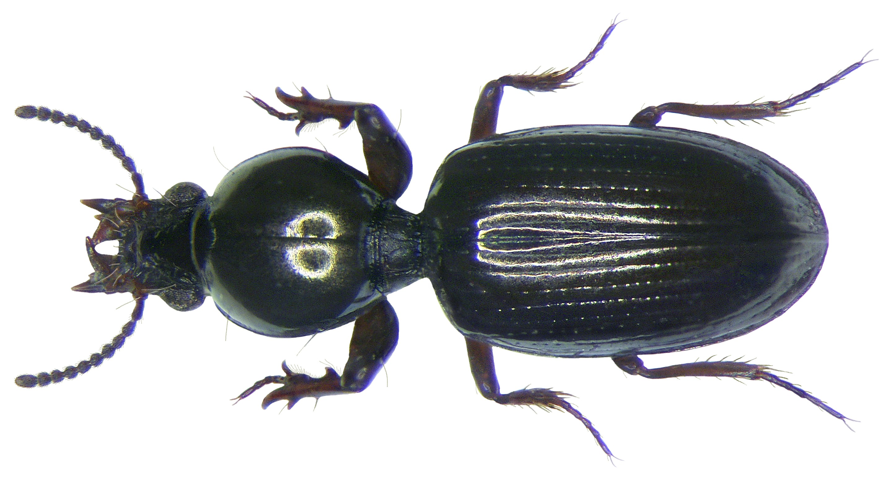 Familie: Carabidae Größe: 3,5-4,6 mm Verbreitung: Europa bis Kaspisches Meer und Ural Ökologie: auf Sand an Gewässerrändern Fundort: Holland, Goes leg. Veldkamp, 1974; det. U.Schmidt, 1983 Foto: U.Schmidt, 2008